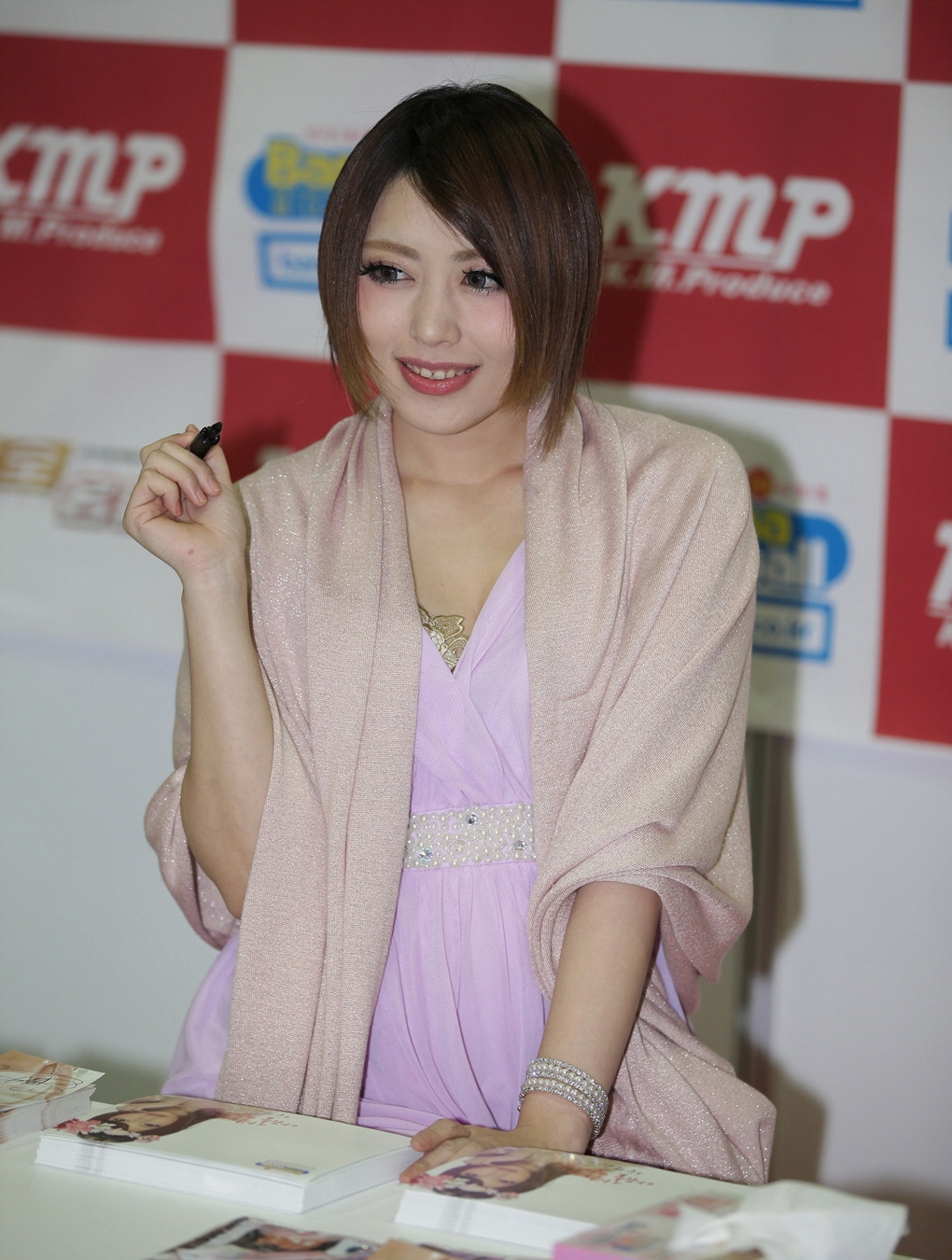 사쿠라이 아유(AYU SAKURAI) 팬싸인회 in 맨즈쇼